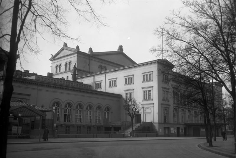 Die staatl. Kroll-Oper und das Schiller-Theater in Berlin sollen geschlossen werden ! Infolge der Sparmassnahmen der Stadt Berlin sollen das Schiller-Theater und die Kroll-Oper geschlossen werden. Ein entsprechender Antrag ist dem Preussischen Landtag zugegangen. Die Kroll-Oper am Platz der Republik in Berlin.